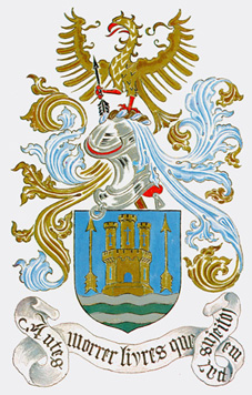 Brazão de Armas do Regimento de Guainição n.º 1 do Exército Português